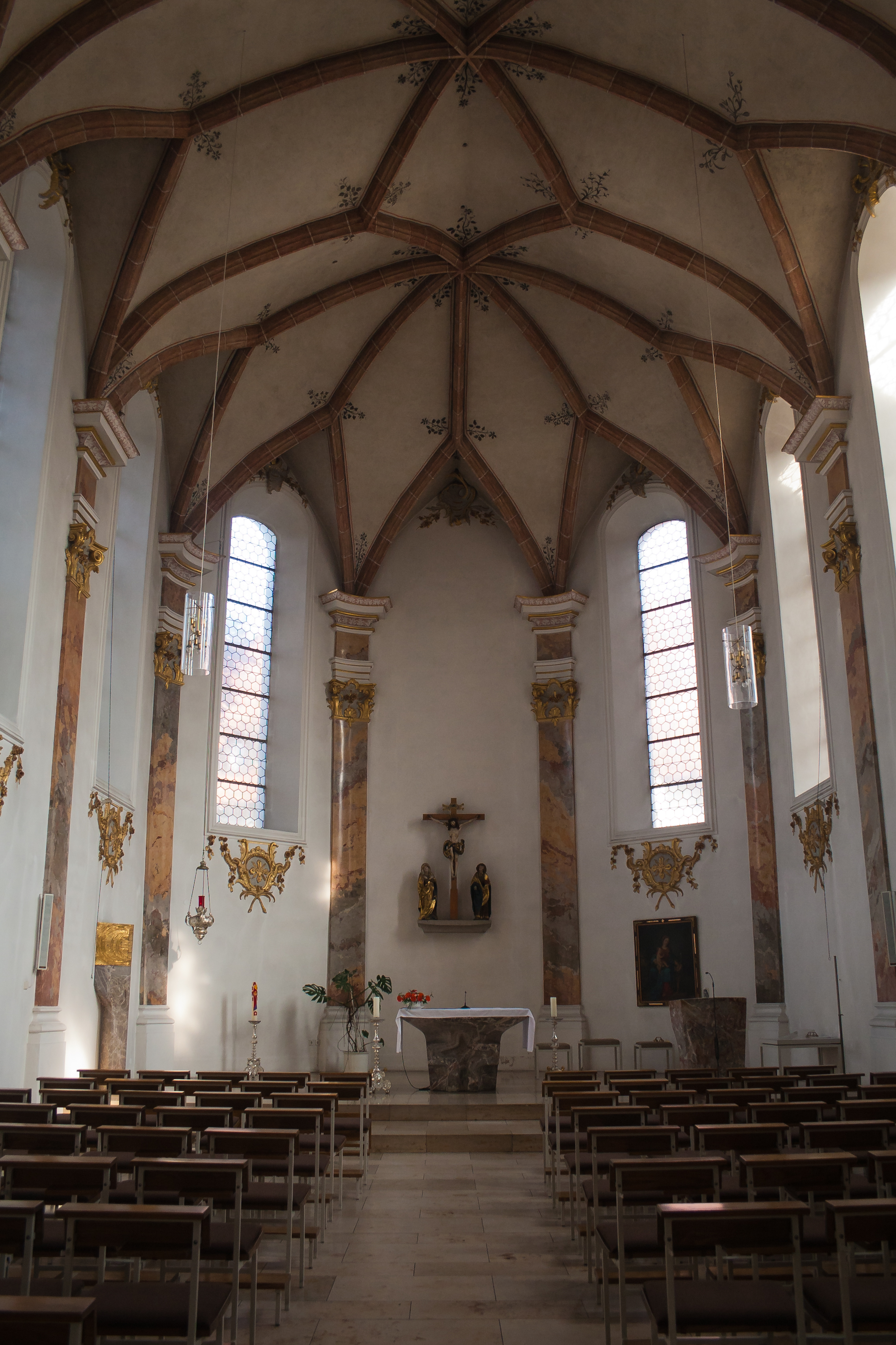 Ulm, Baden-Württemberg, Germany